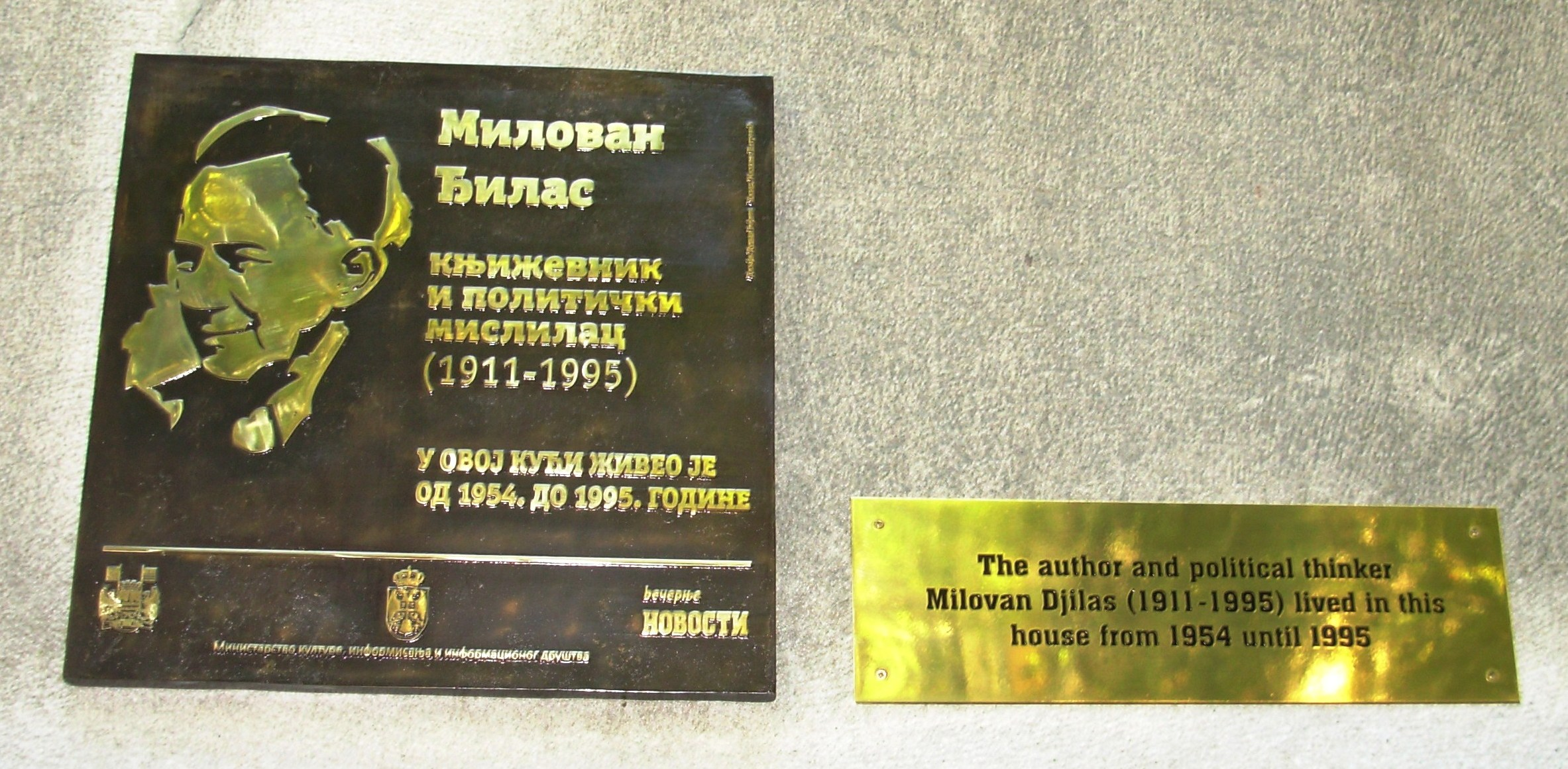 Novootkrivena tabla u Palmotićevoj ulici u Beogradu. Slikao Goldfinger